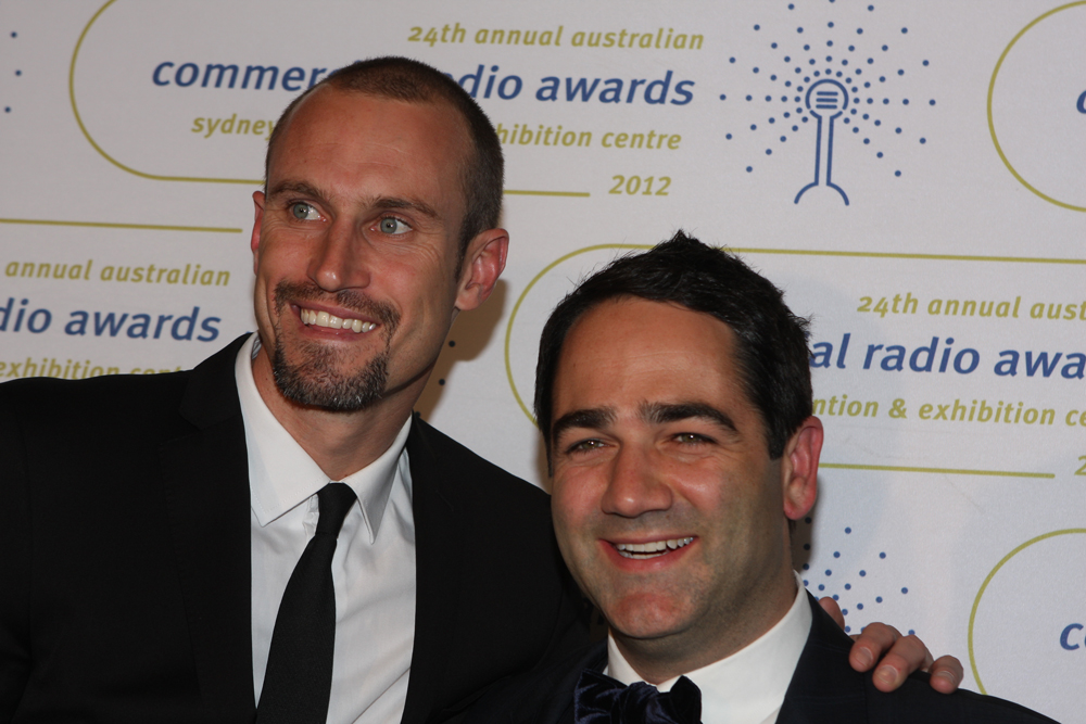 Ryan Fitzgerald - Fitzy and Wippa -Michael Wipfli